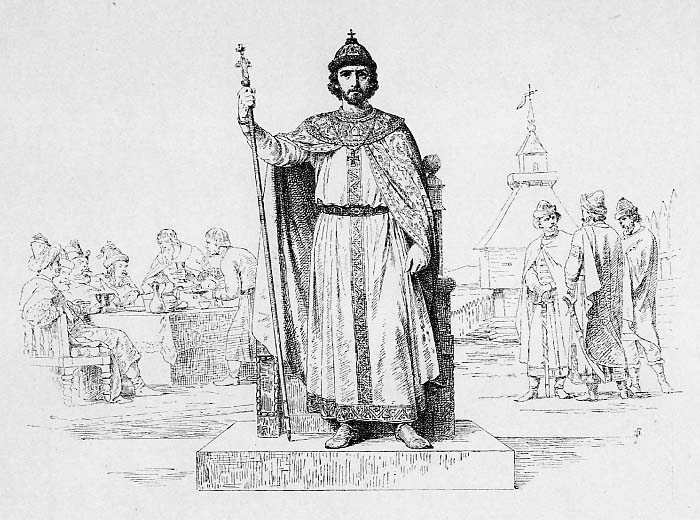 Великий Князь Симеон Иоаннович, позванием Гордый. 1340-1353 г.Продолжая дело дольновидного отца, Симеон отличался непоколебимо твердым характером. Задабривая хана почетом, строго повелевал удельными князьями и первый именовался "Великим Князем всея Руси". К его княжению относится начало Троицкой Лавры.